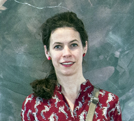 Foto der Künstlerin Lilla von Puttkamer (Selbstportrait)